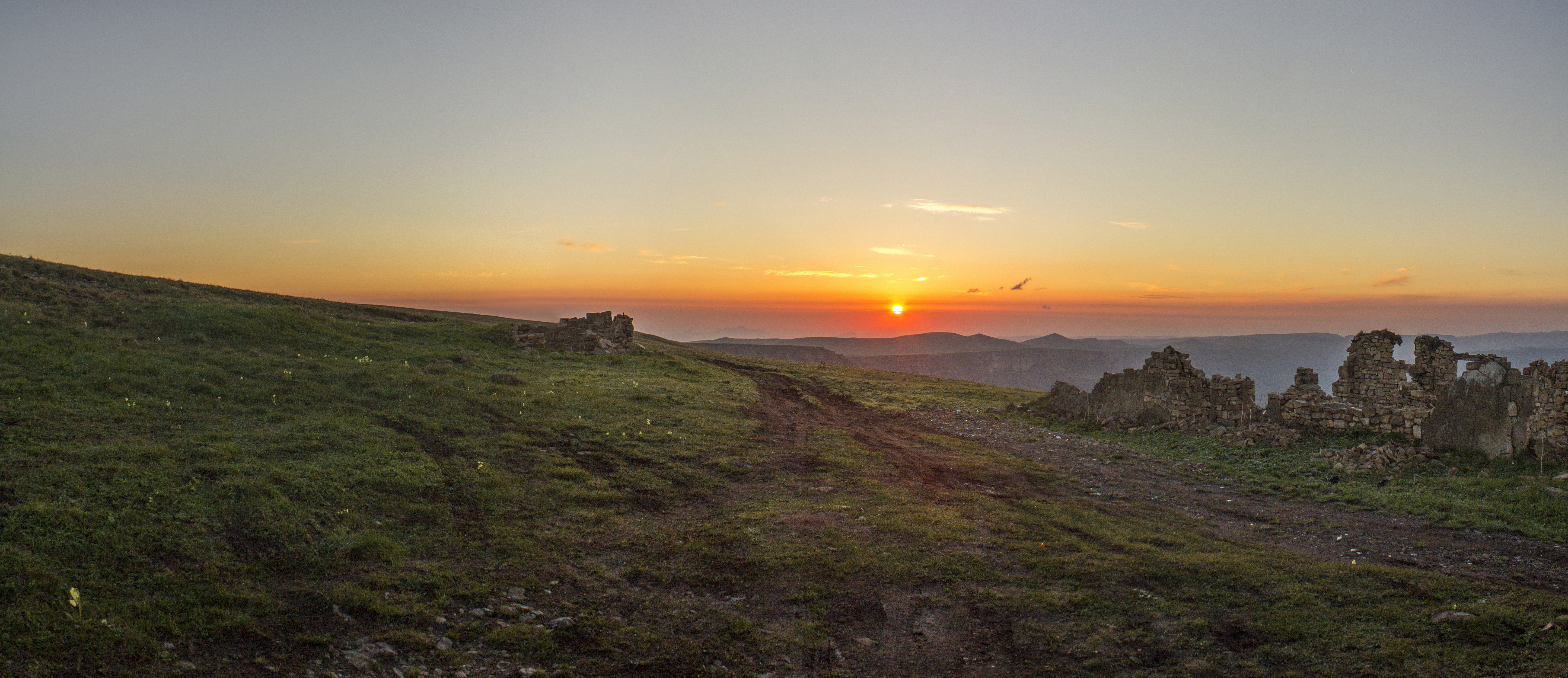 Хасаутский заказник: На территории Малокарачаевсого района. Расстояние от границы заказника до районного ценра с. Учкекен 20 км. С восточной стороны заказник граничит с Кабардино-Балкарской Республикой, а от южной границы до г. Эльбрус 14 км. Верховья рек Эшкакон и Подкумок,Черкесск,Малокарачаевский район, Карачаево-Черкессия This image is related to the protected area of Russia number 0910051